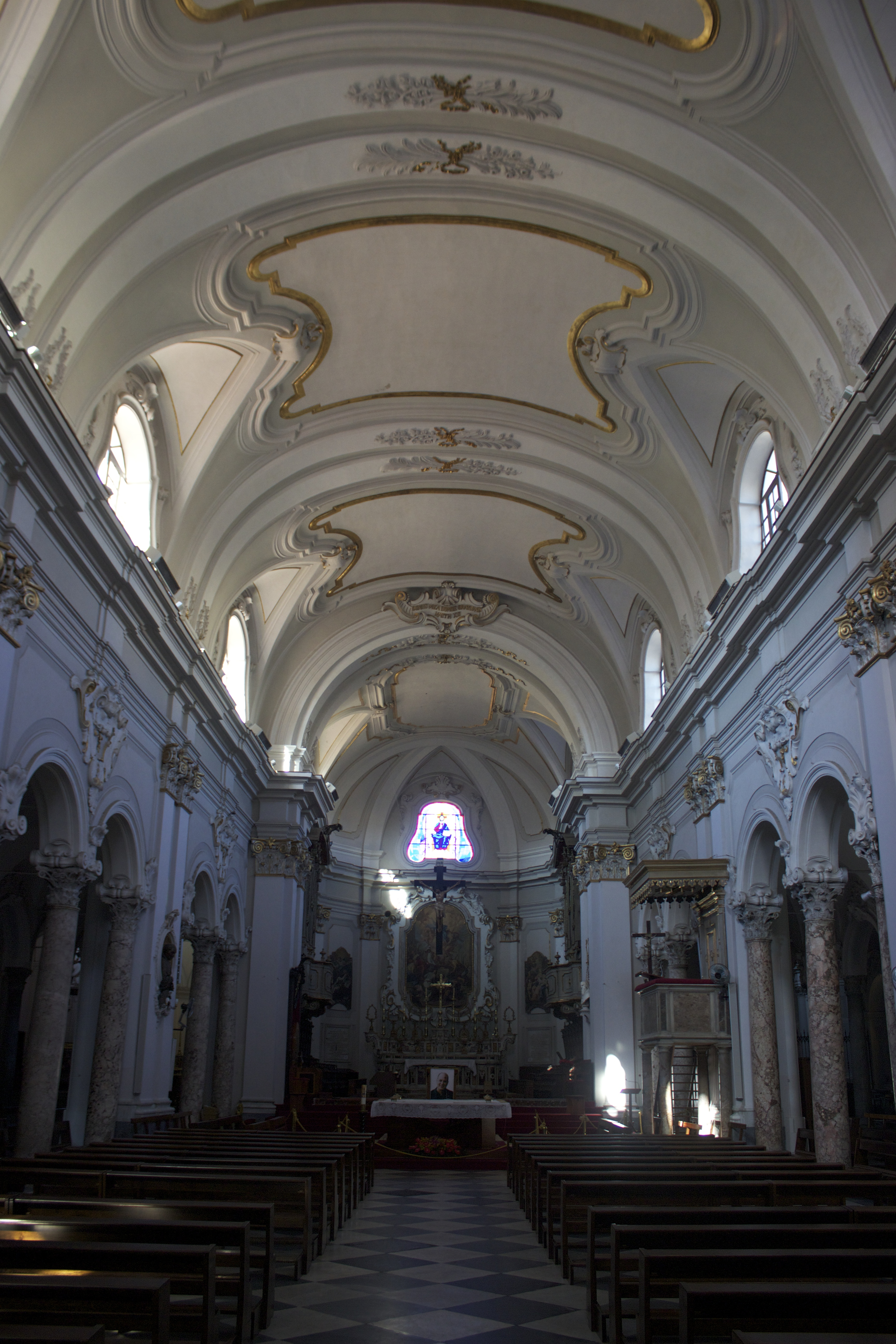 Santa Maria Capua Vetere. Catedral.